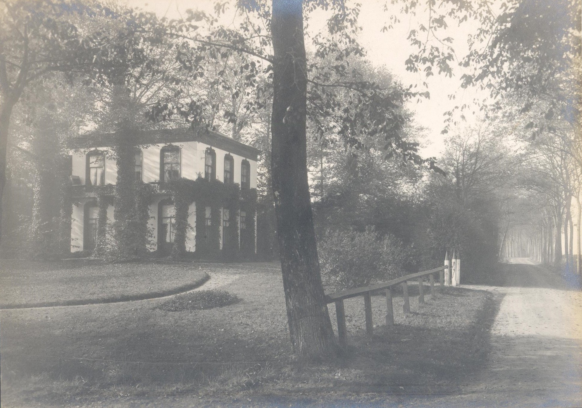 Huize Schepel Winsum